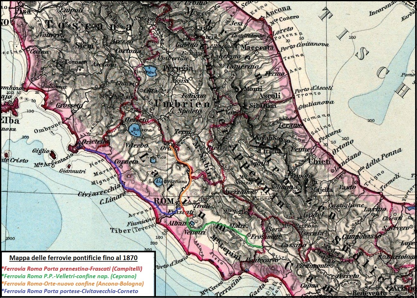 Mappa delle ferrovie dello Stato pontificio al 1870